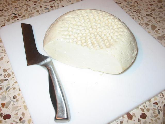 Сир Бринза: головка сиру карпатської бринзи